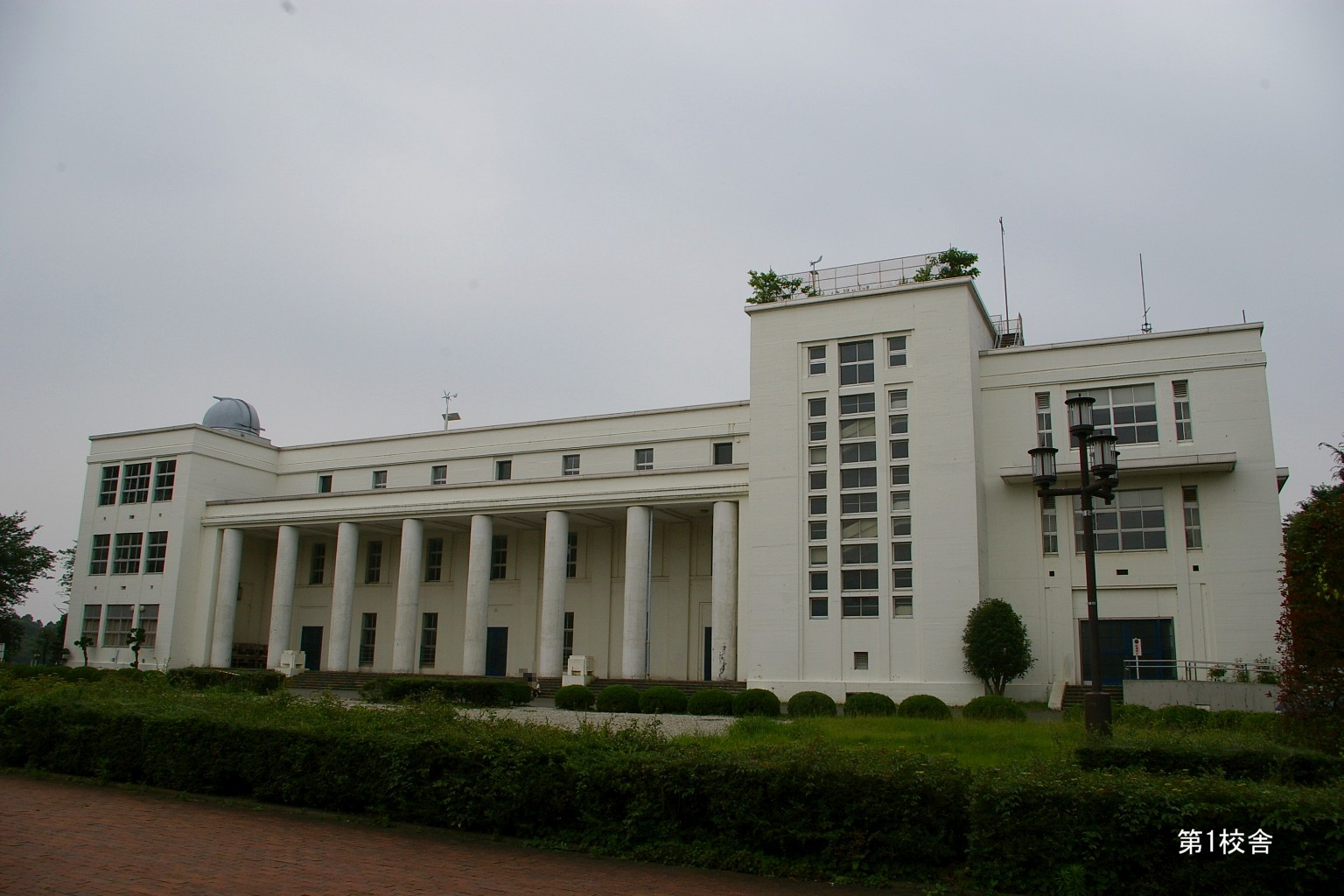 2009.6横浜市で塾生 (talk)が撮影